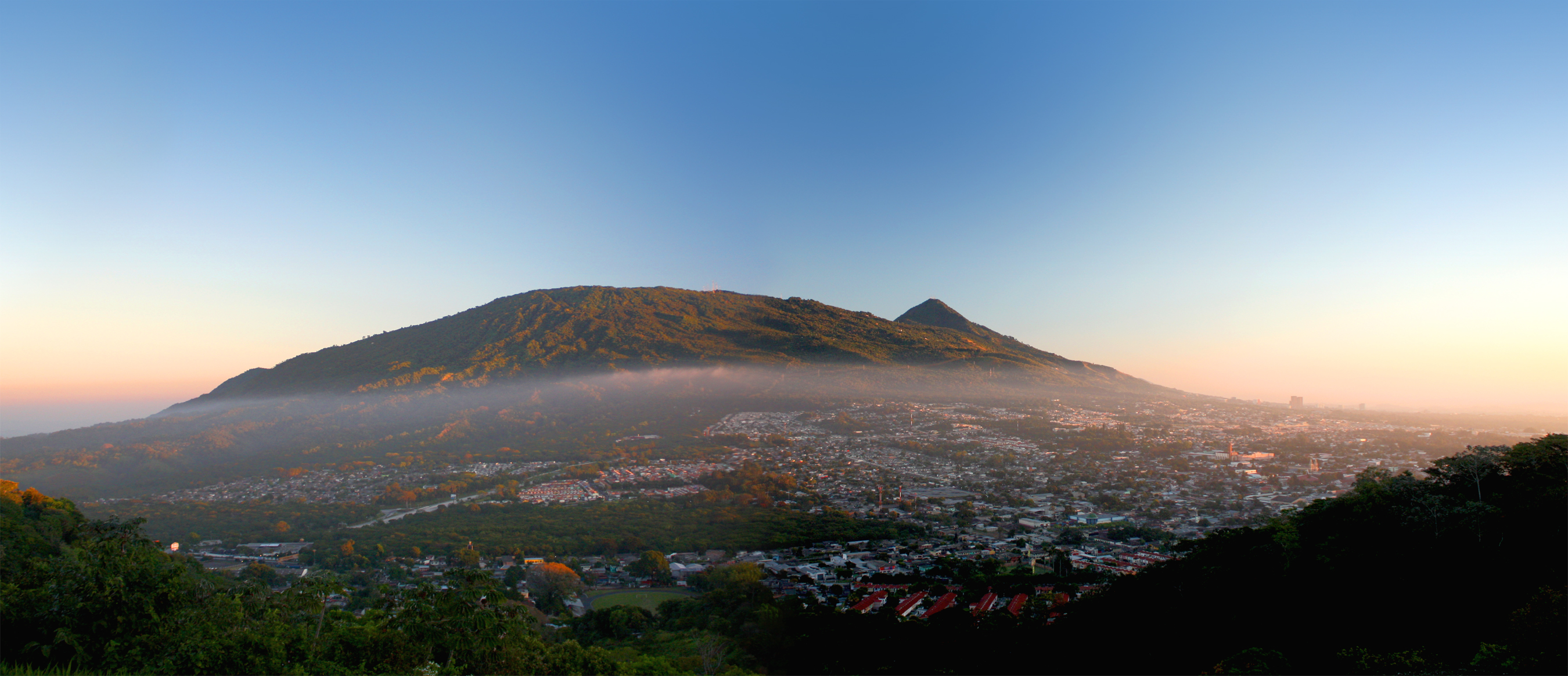 Vista de Santa Tecla desde Comasagua al amanecer.